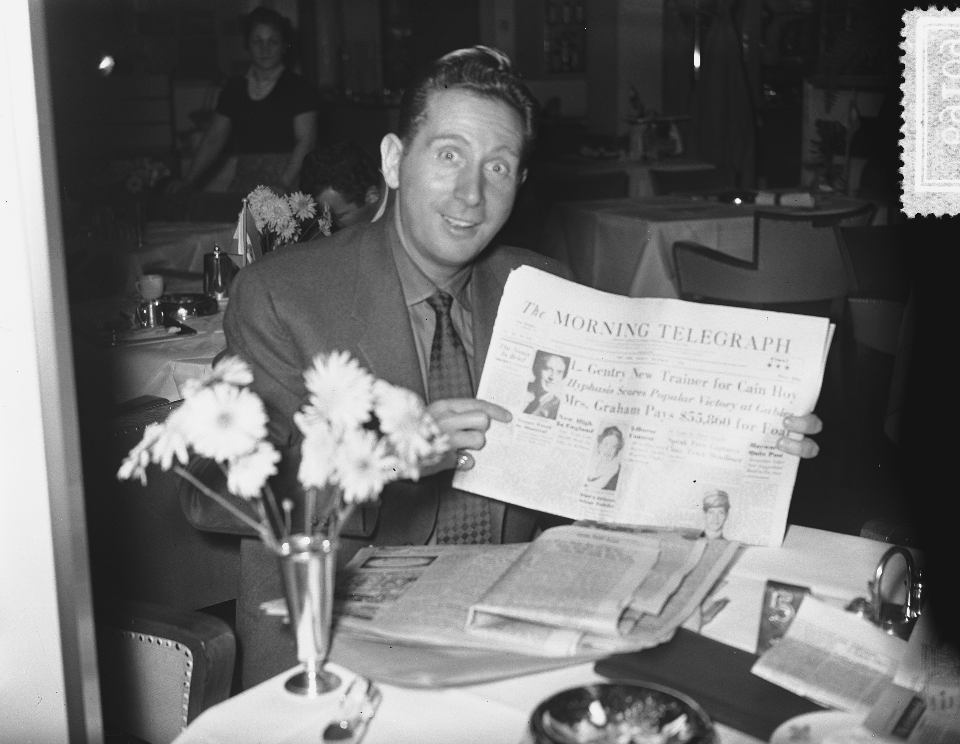 Collectie / Archief : Fotocollectie Anefo Reportage / Serie : [ onbekend ] Beschrijving : Charles Trenet op doorreis op Schiphol Datum : 21 december 1954 Locatie : Schiphol Trefwoorden : zangers Persoonsnaam : Trenet, Charles Fotograaf : Bilsen, Joop van / Anefo Auteursrechthebbende : Nationaal Archief Materiaalsoort : Glasnegatief Nummer archiefinventaris : bekijk toegang 2.24.01.09 Bestanddeelnummer : 906-9109